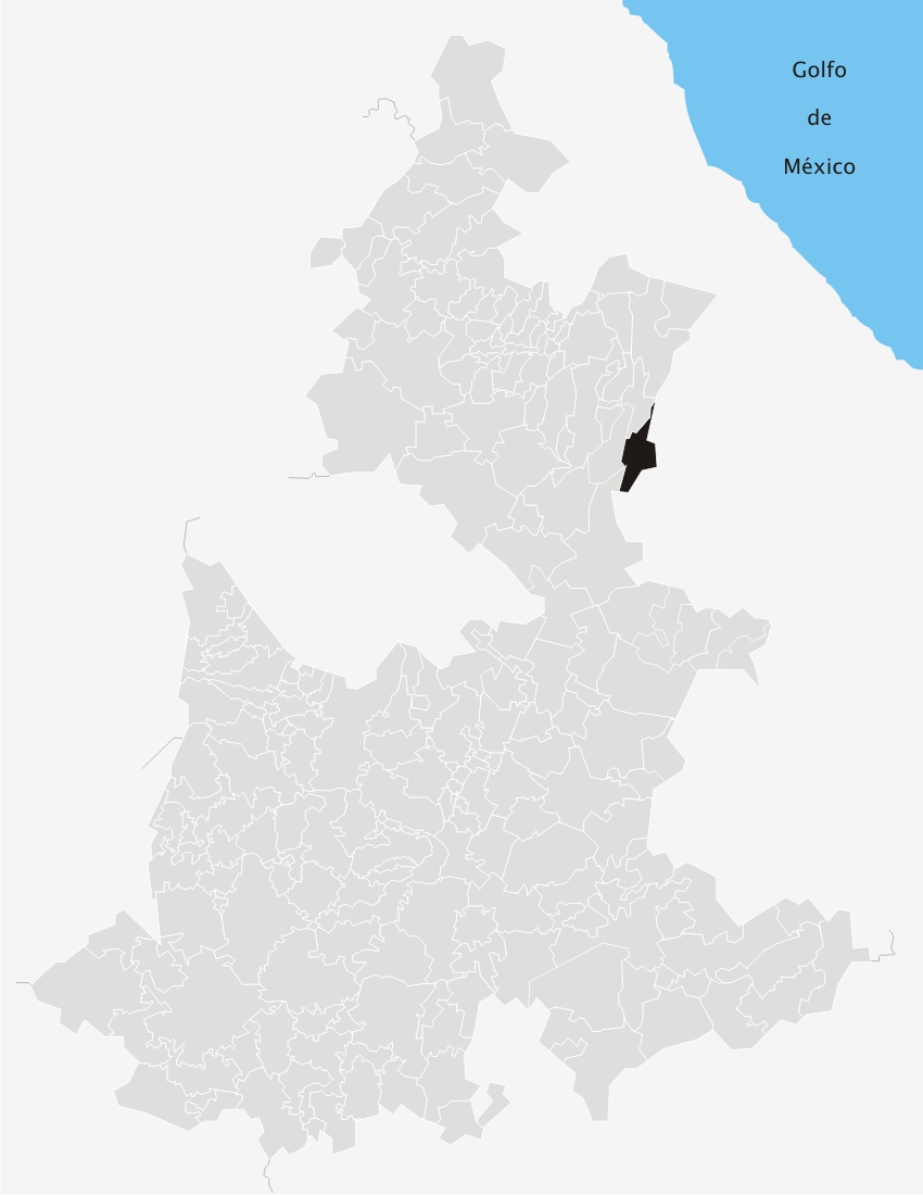 Localización del municipio de Xiutetelco en el estado de Puebla (México)